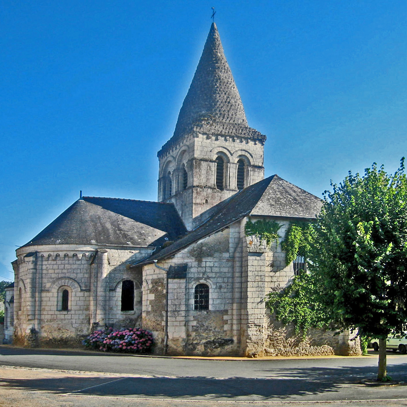 Église Saint-Évroul de Cuon (Maine-et-Loire, France).